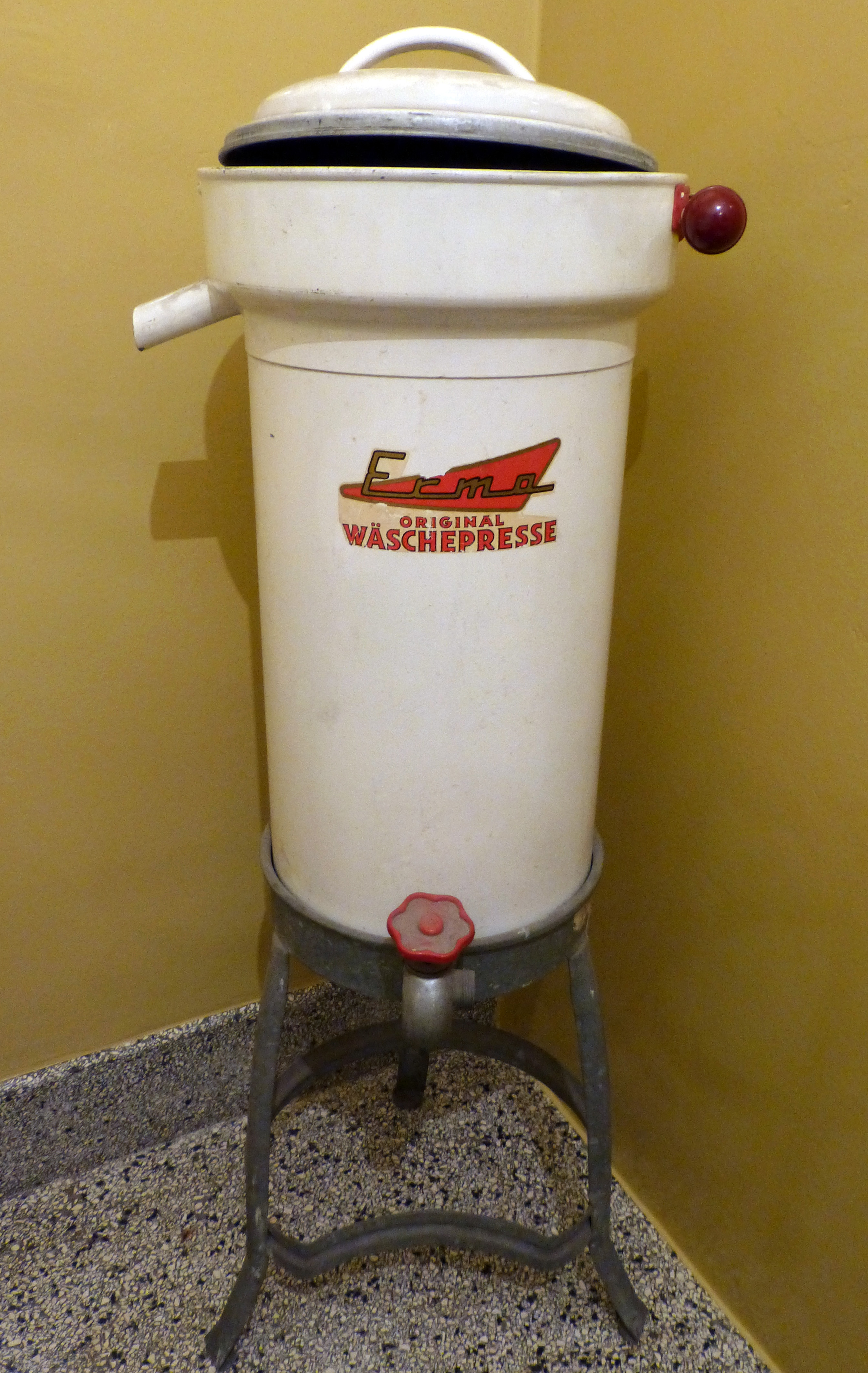 Erna Original Wäschepresse.